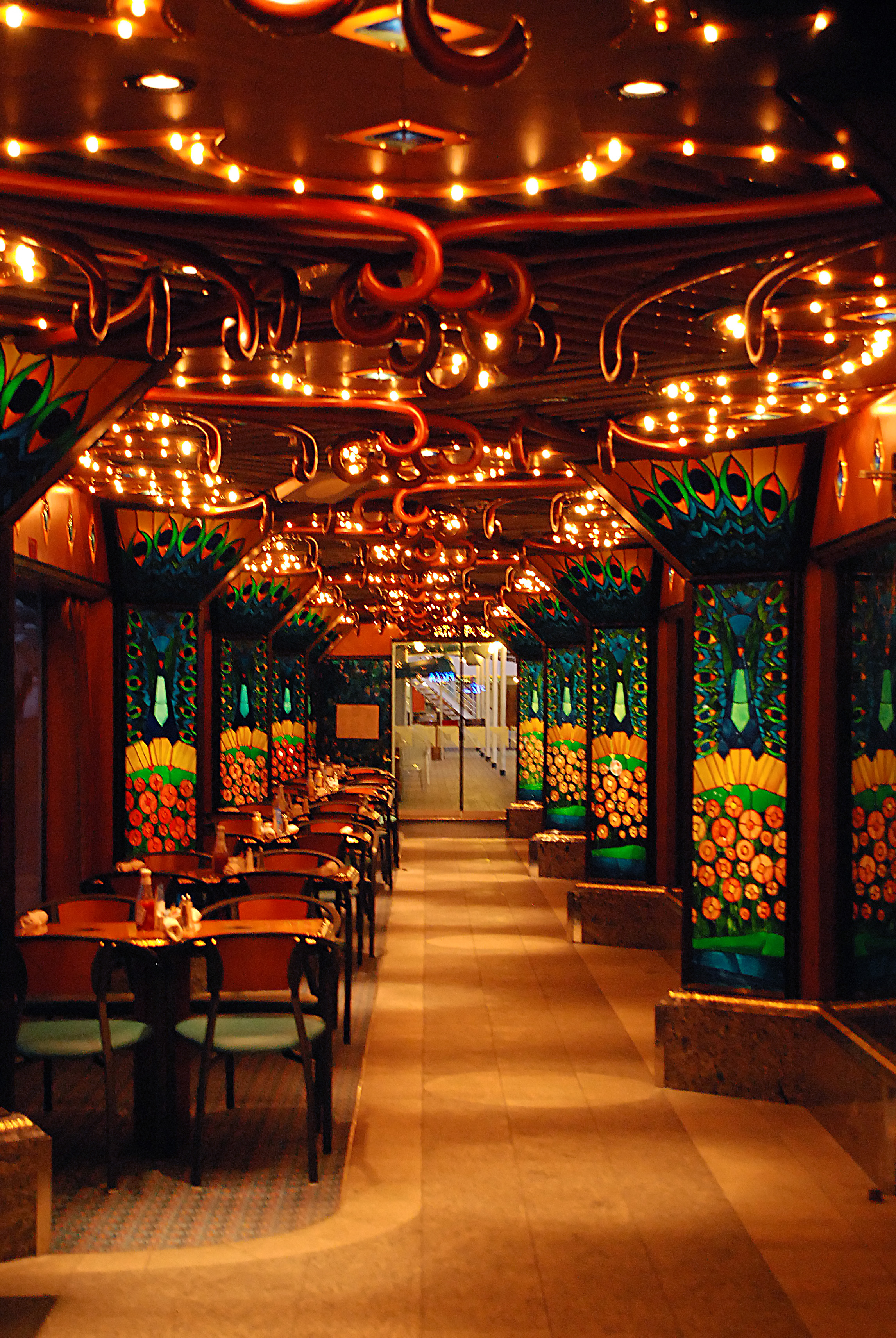 Les gallery du carnival Elation